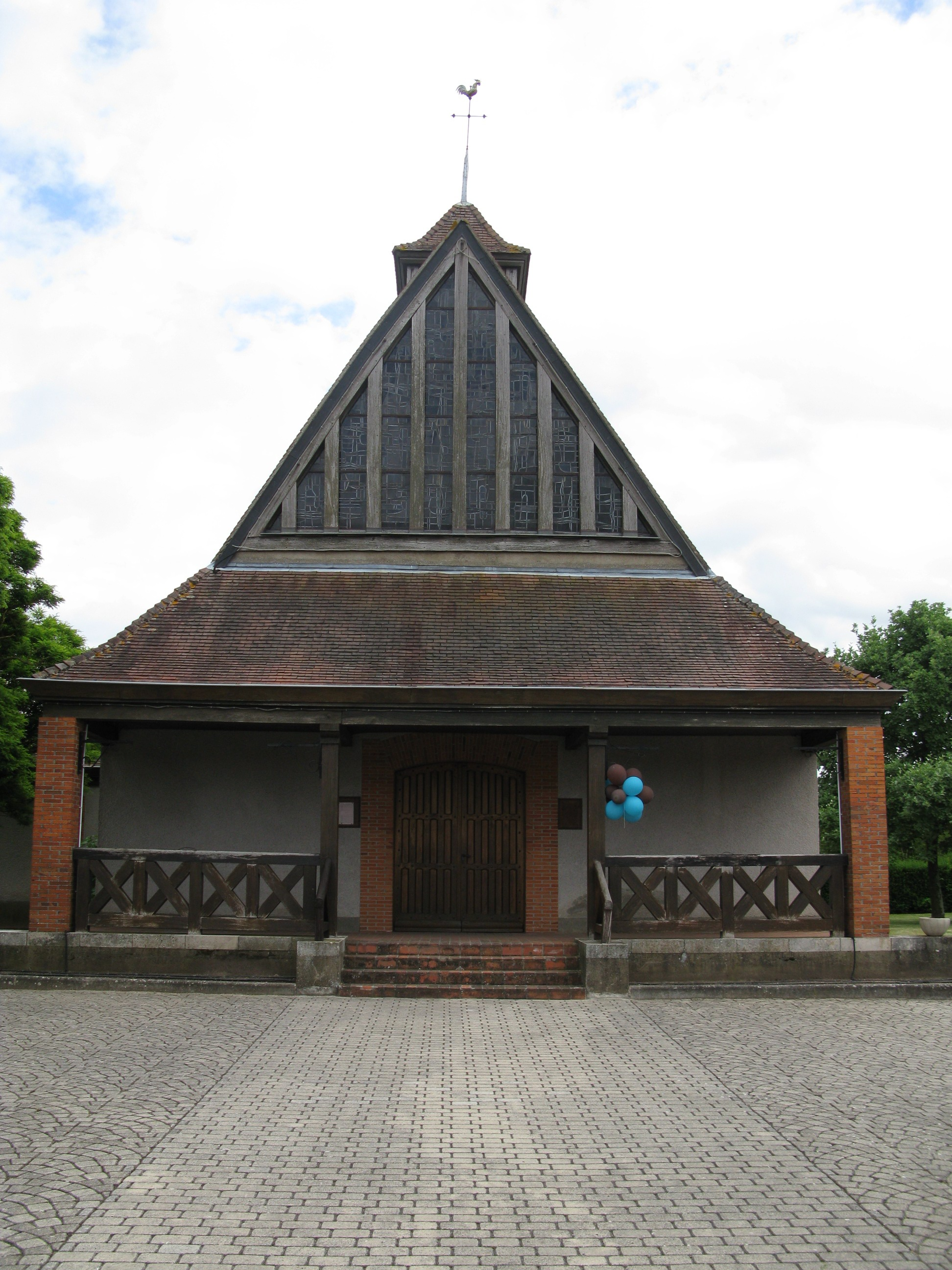 OpenStreetMap(Info) L'église de Saint-Père-sur-Loire